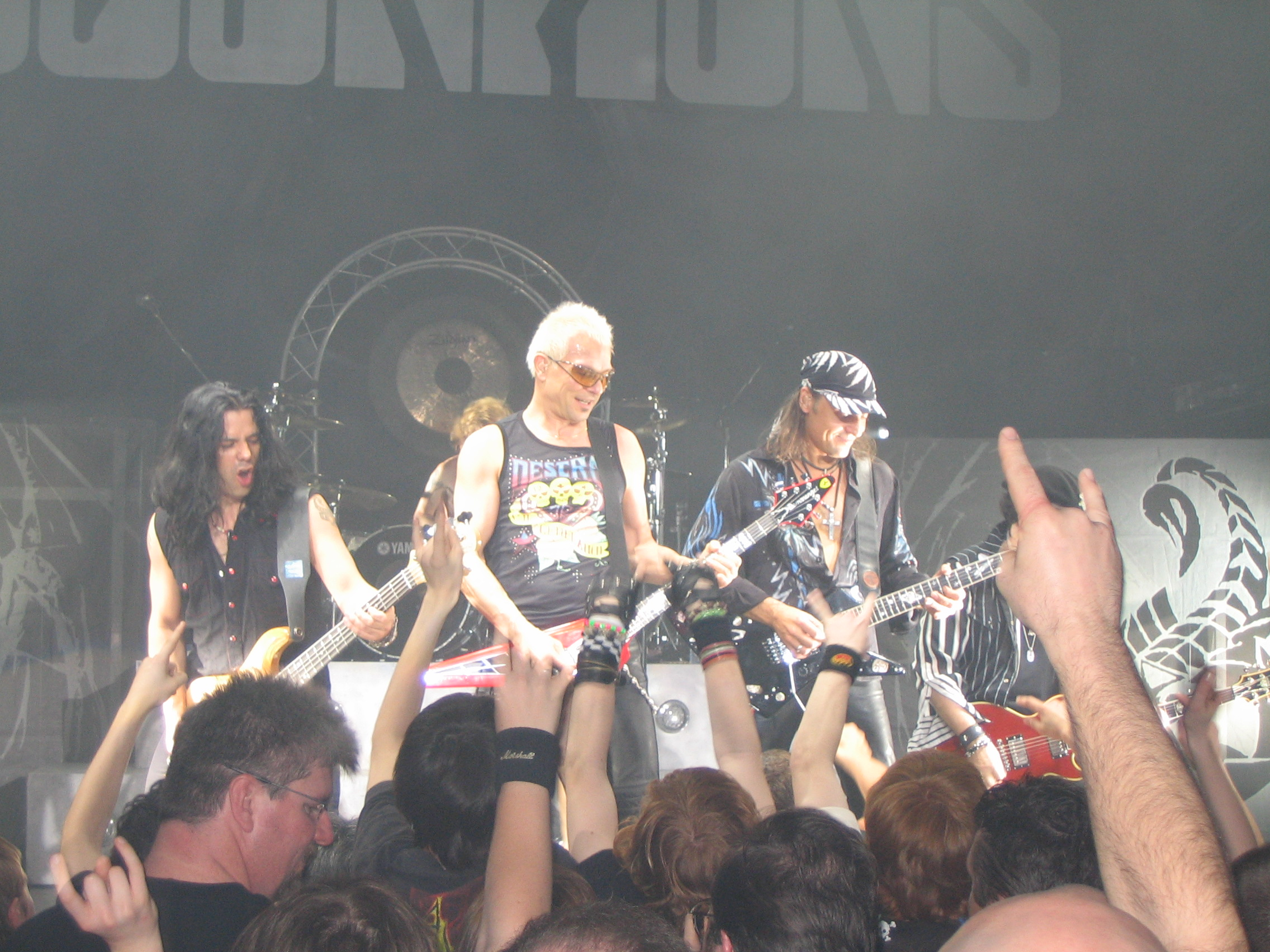 Matthias Jabs, Klaus Meine, Ralph Rieckermann and Rudolf Schenker of Scorpions.